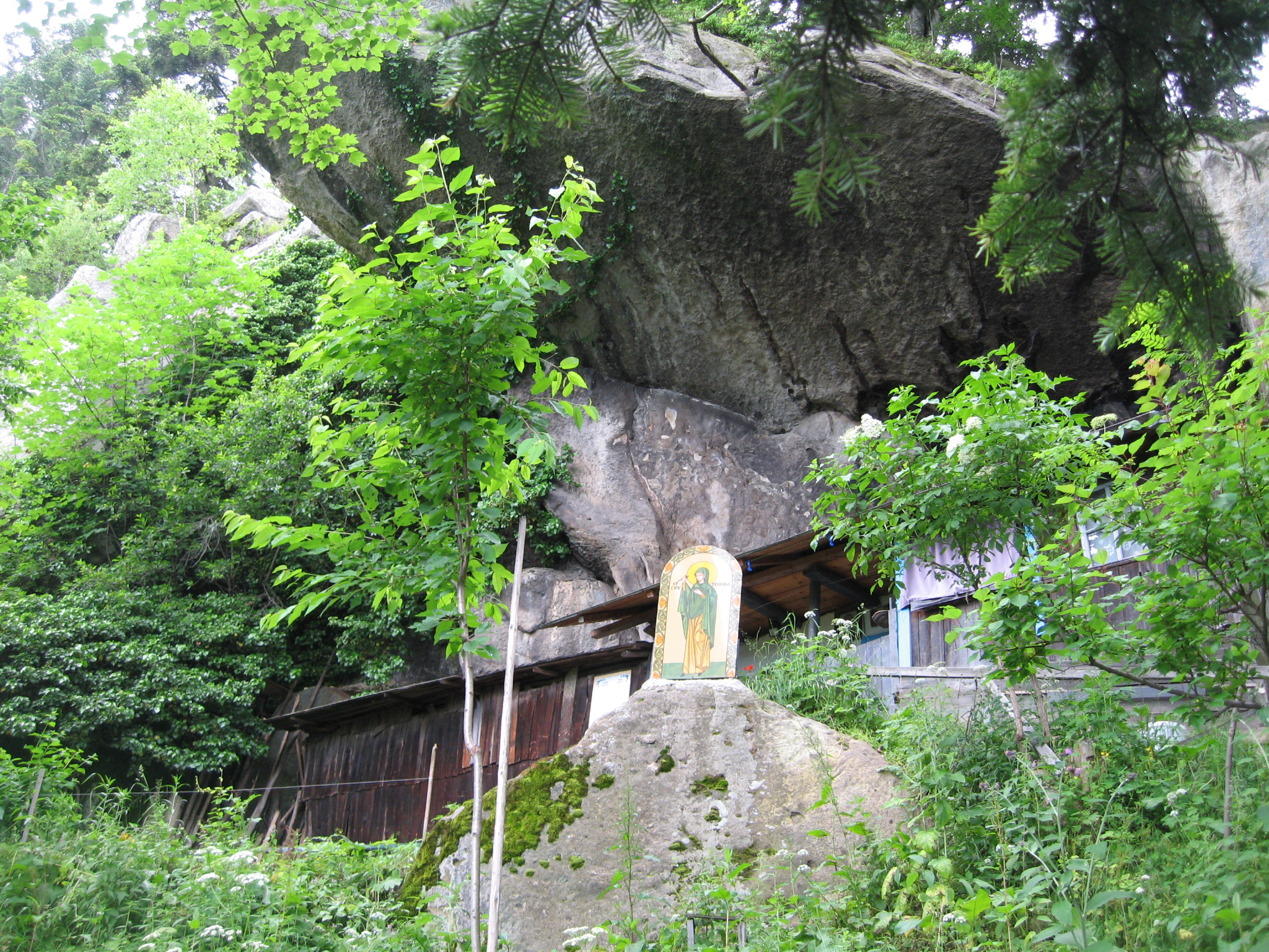 Mănăstirea Sihla